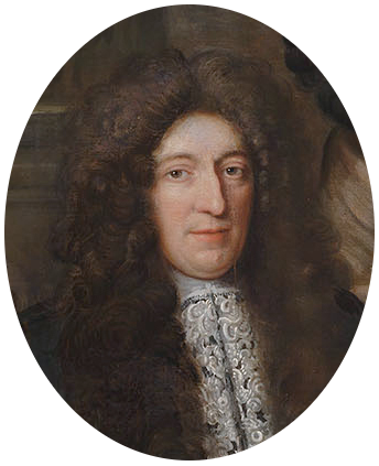 Johan Dedel (1636-1715), advocaat, schepen en burgemeester van Den Haag.